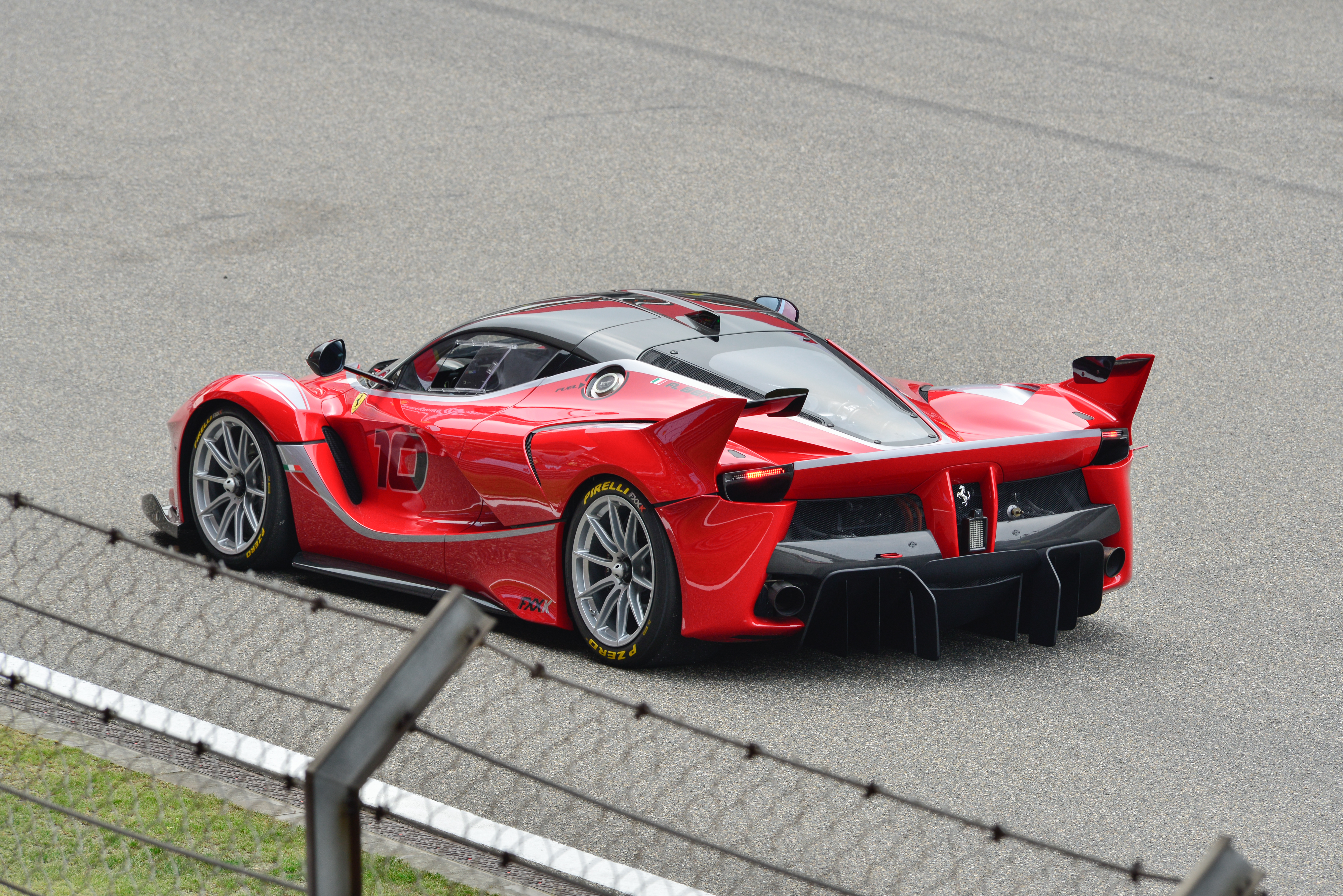 Ferrari FXXK